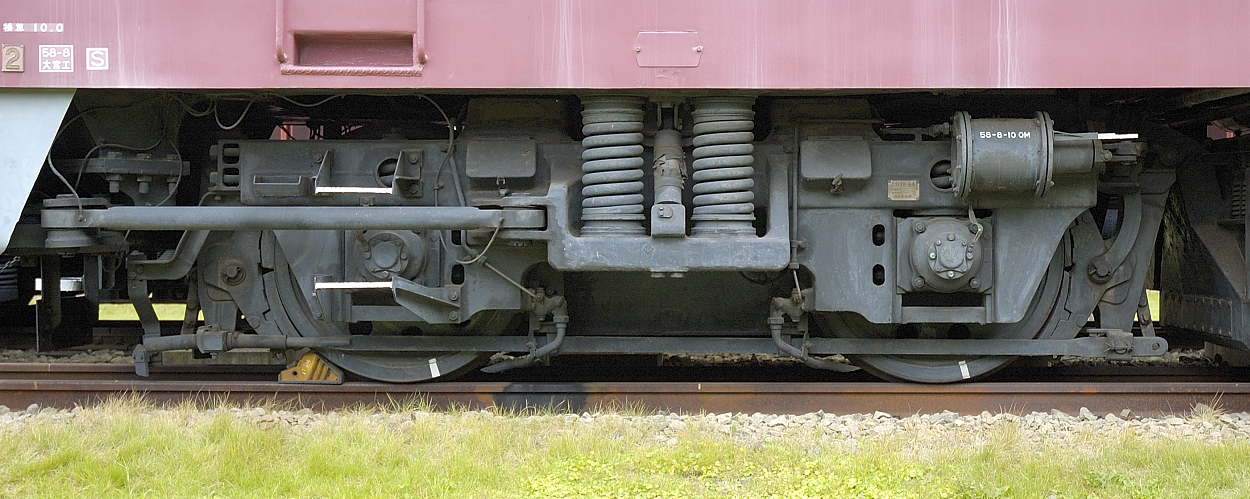 日本国有鉄道（国鉄）所属 EF80形電気機関車 (EF80 63) のDT135形台車